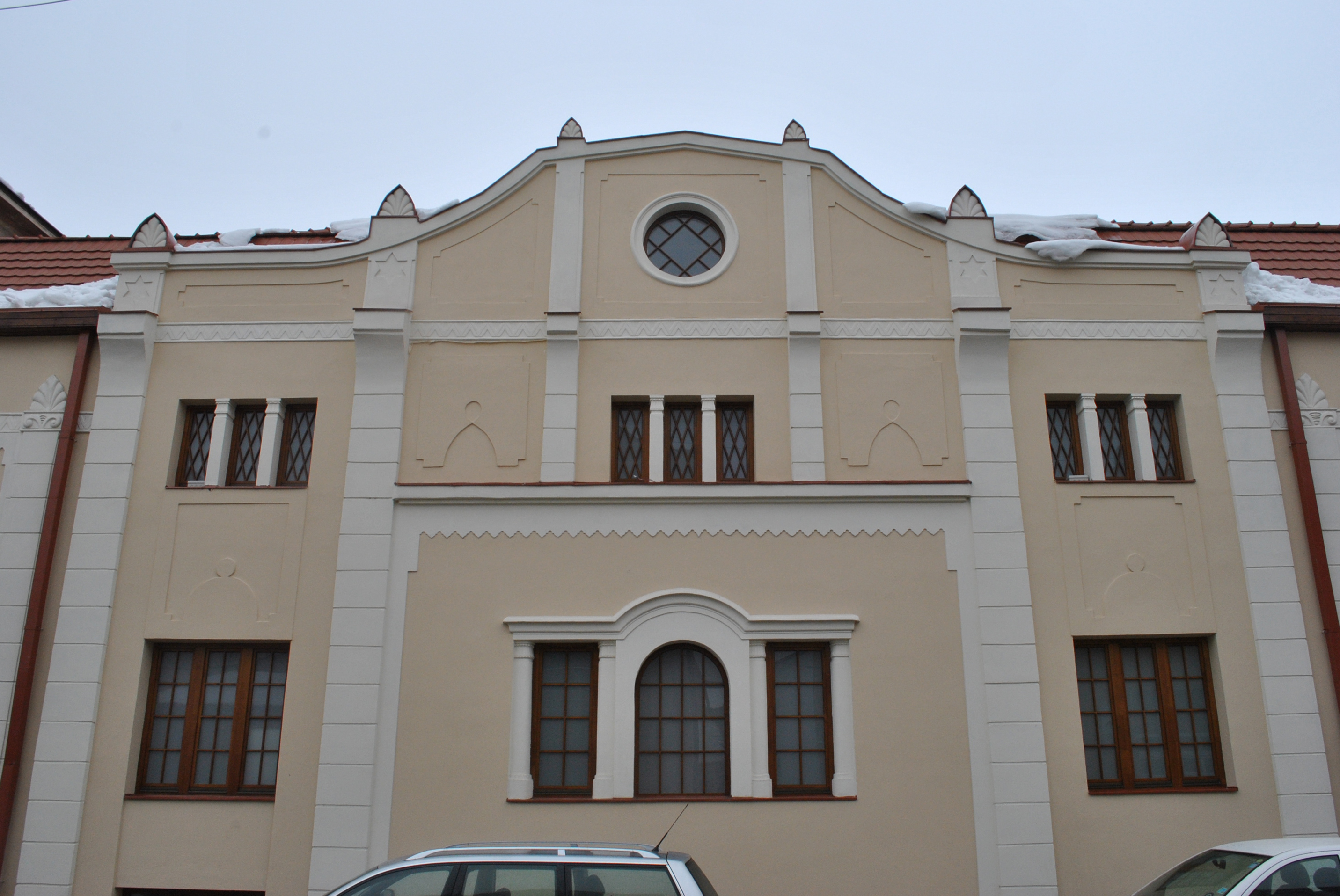 Fosta casă de cultură evreiască